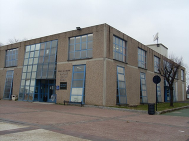 Espace culture Victor Hugo de Dugny et la médiathèque Anne Franck - 2007